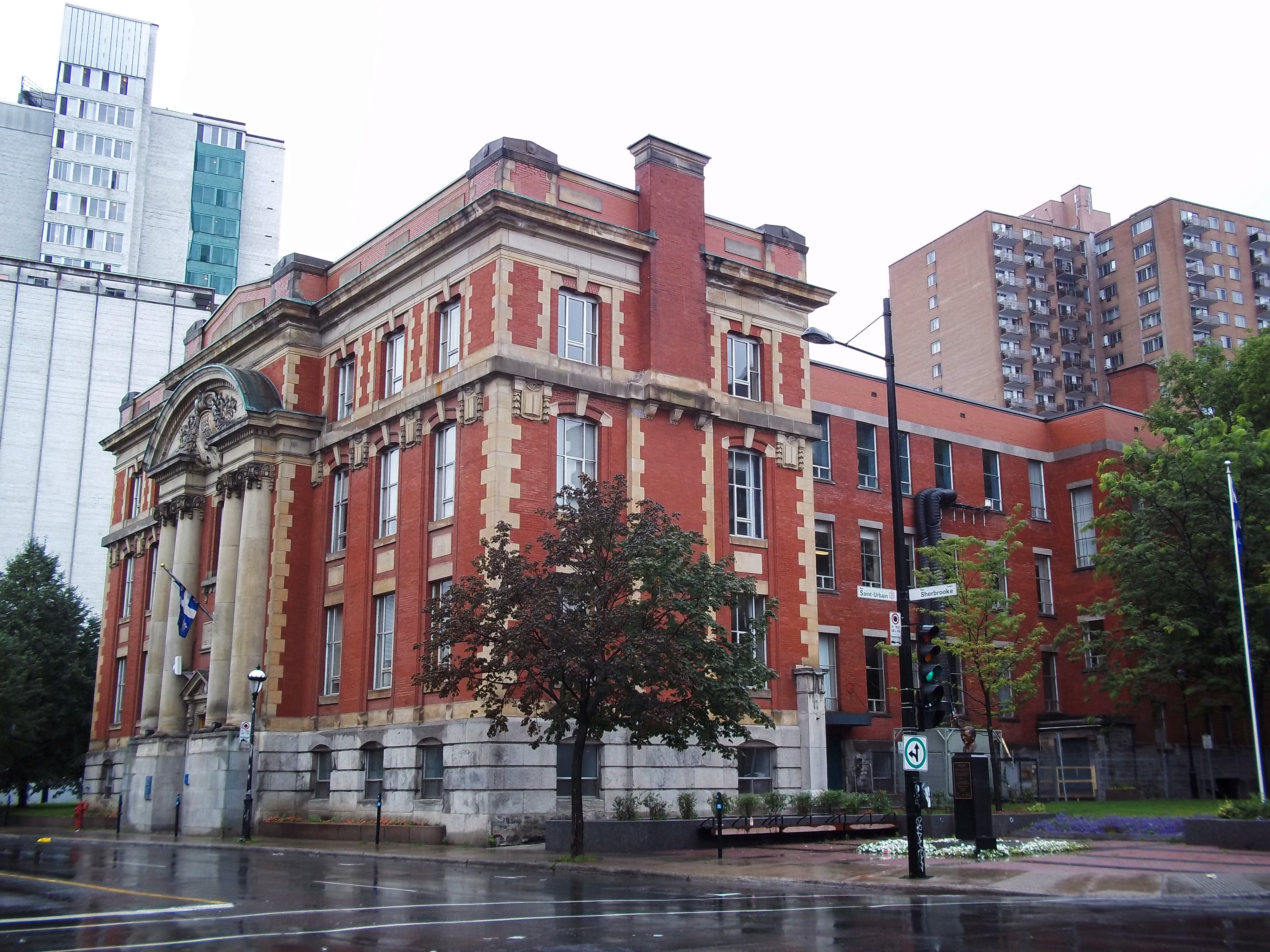 Commercial & Technical High School, 125, rue Sherbrooke Ouest, Montréal Aussi connu sous le nom de : École des Beaux-Arts UQAM-Pavillon des Arts Édifice Camille-Laurin Grand répertoire du patrimoine bâti de Montréal